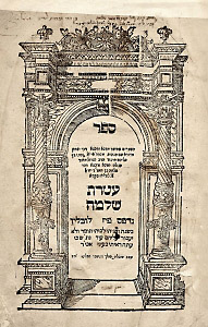 Shaarei Dura des Issak ben Meir